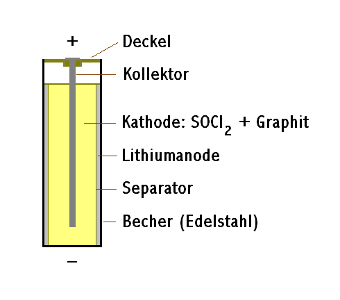 Schema einer Lithium-Thionylchlorid-Batterie (Zylinderform)